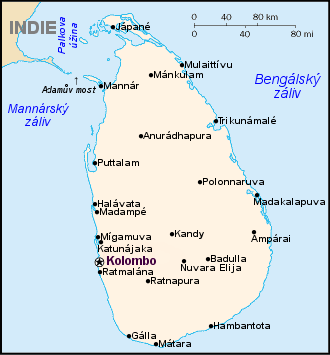 Orientační mapa Šrí Lanky.